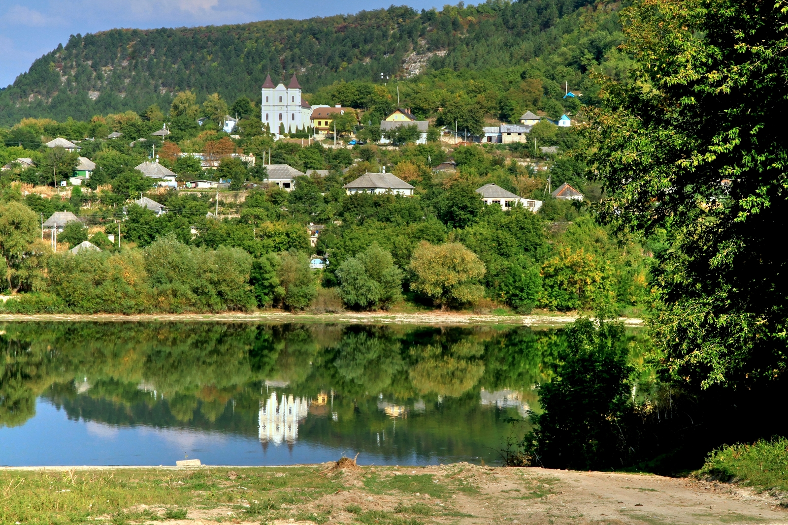 Рашковский комплекс, монумент природы, находится в Приднестровия, Каменский район, У с. Рашков, Рашковское лесничество, урочище Дялул рошу, кварталы 20, 2 (код MD-CC-mn.A-010) A-010